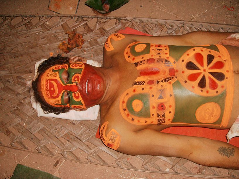 വേട്ടയ്ക്കൊരു മകന്റെ തെയ്യത്തിനു മുഖത്തെഴുതിയിരിക്കുന്നു. കോലധാരി: ശ്രീ.ബാലകൃഷ്ണൻ പെരുവണ്ണാൻ